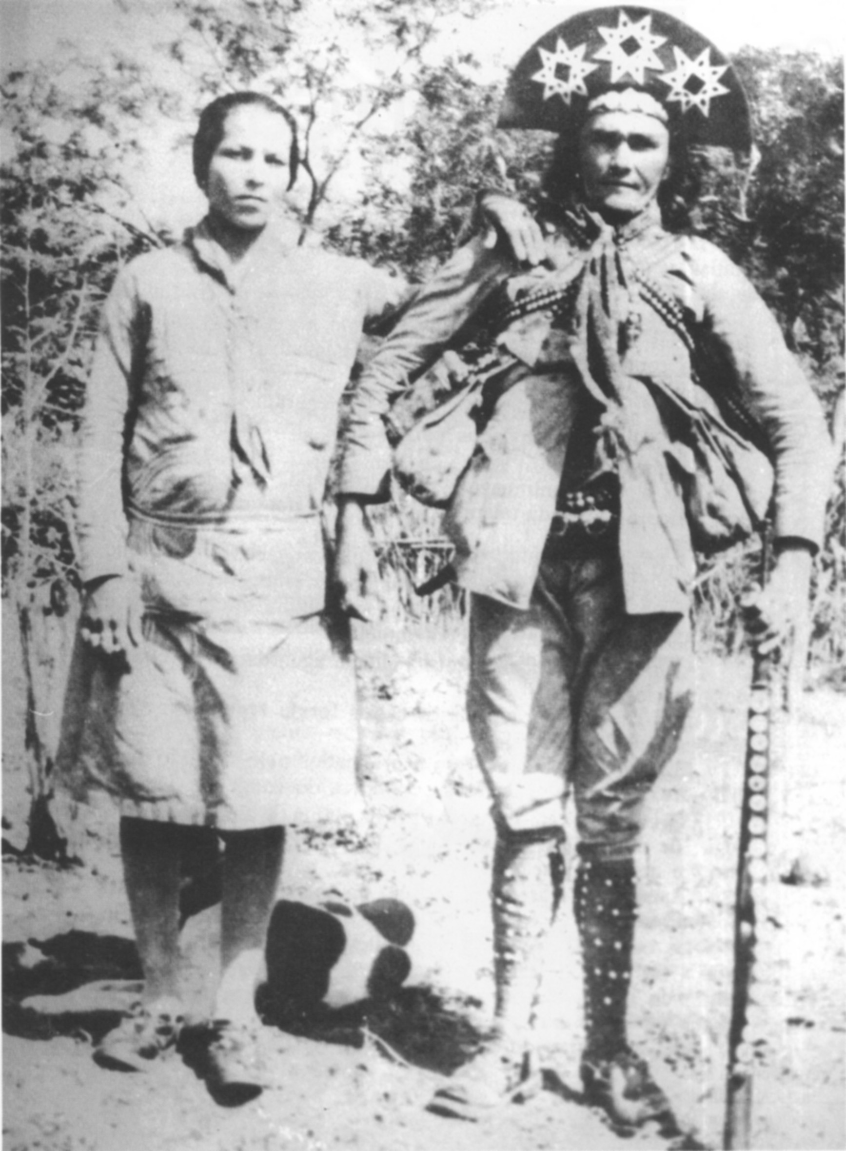 Retratos do cangaço: cangaceiros Dadá (Sérgia Ribeiro) e Corisco.